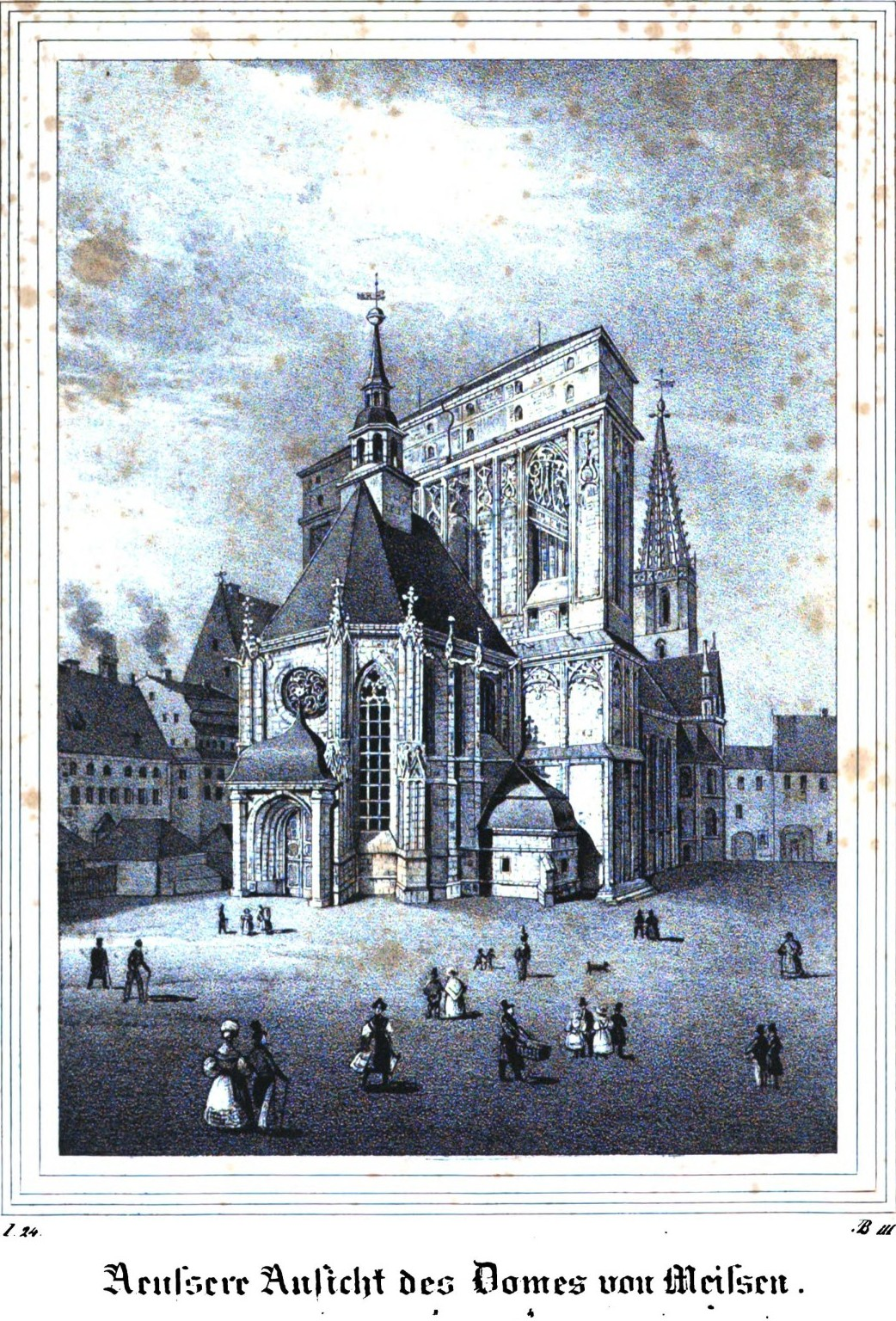 Saxonia Museum für saechsische Vaterlandskunde. Band 1. Dresden: Pietzsch und Comp. Siehe File:Saxonia Museum für saechsische Vaterlandskunde I.djvu